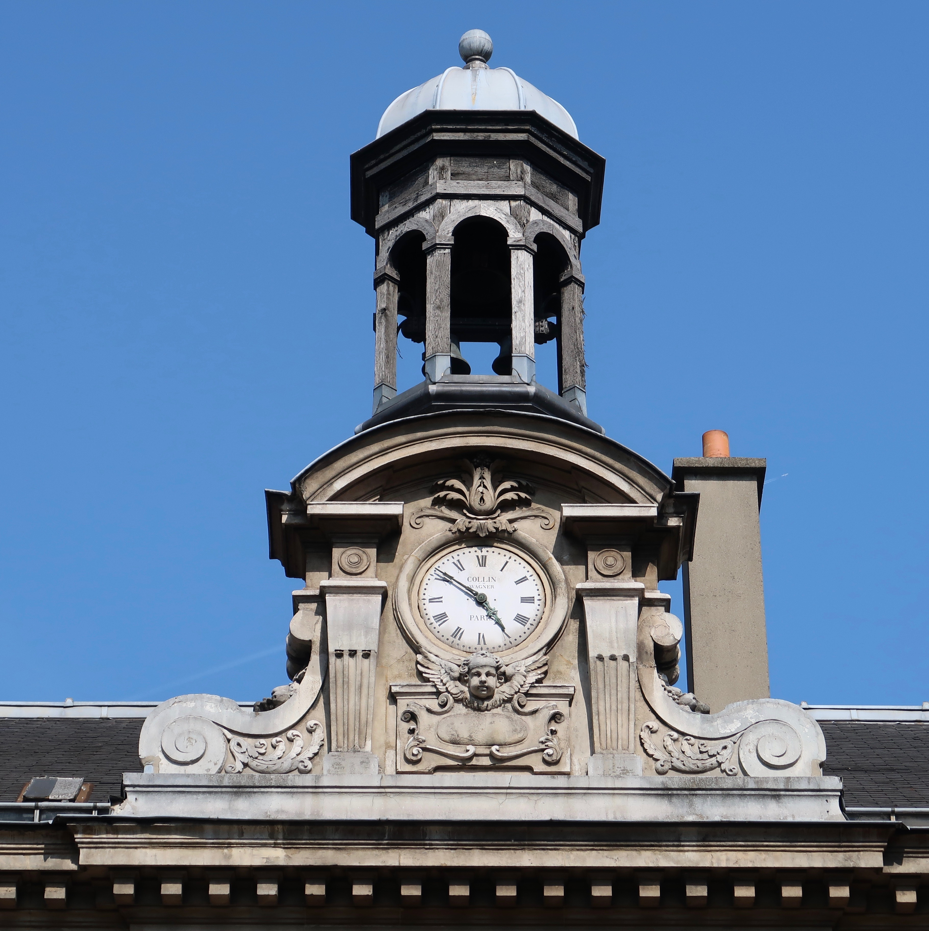 Clocheton du lycée Condorcet, 8 rue du Havre (Paris, 9e).